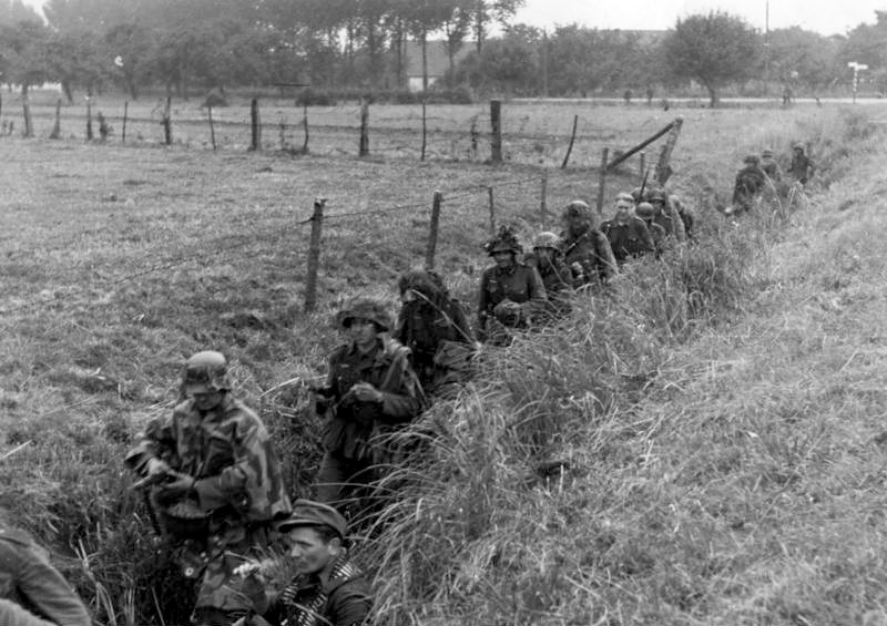 Arnheim, Grenadiere gehen durch Gräben vor Scherl Bilderdienst Westen, September 1944, Anglo-amerikanischer Umfassungsplan bei Arnheim gescheitert. In den Gräben, die das unübersichtliche Gelände überziehen, arbeiten sich Grenadiere des Heeres vor. Durch ihr entschlossenes und schnelles Zupacken wurde die 1. britische Luftlande-Division vollständig aufgerieben, sodaß sich unter dem Eindruck der Vernichtung stehend, selbst die gegnerrische Presse veranlaßt sieht, von "einem nicht zu verachtenden Erfolg Deutschlands" zu berichten SS-PK. Pospesch ADN-Bildarchiv, II. Weltkrieg 1939-45, Schlacht um Arnheim (Holland) vom 17.-27.9.1944 Die am 17.9.1944 begonnene alliierte Luftlandeoperation bei Arnheim sollte die Übergänge Rhein, Maas und Waal sichern. Nach großen Verlusten wurden die gelandeten Truppen Ende September zurückgezogen. Durch Gräben, die das unübersichtliche gelände durchziehen, arbeiten sich deutsche Heeresgrenadiere vor. Aufnahme: Pospesch